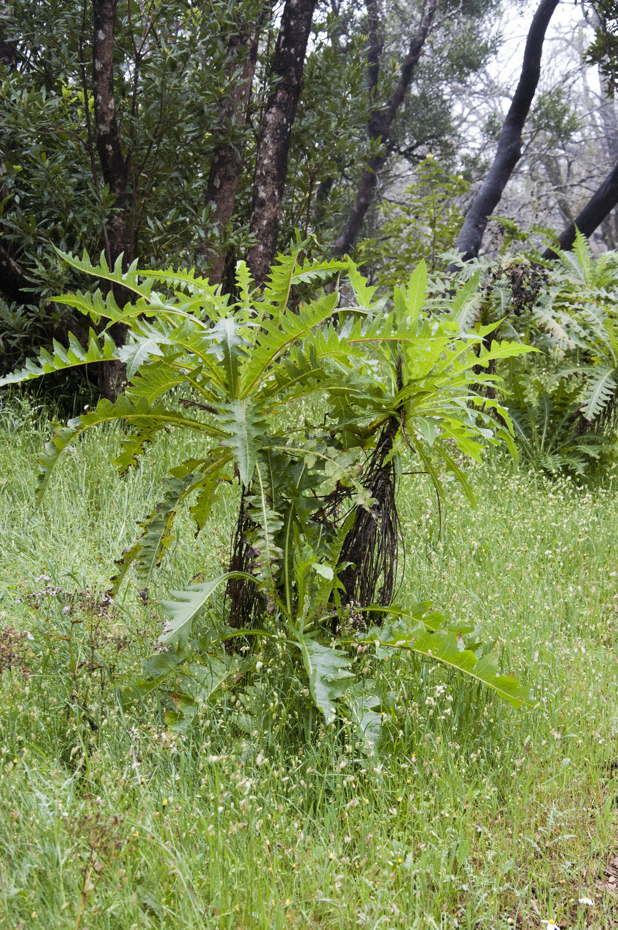 Sonchus hierrensis Parco nazionale di Garajonay, La Gomera